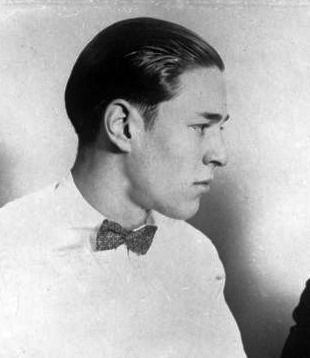 Zu dem sensationellen Mordprozess der amerik. Millionärssöhne Richard Loeb und Nathan Leopold in Chicago ! Richard Loeb (rechts) und Nathan Leopold (links) die Mörder des 14 jährigen Robert Franks, welche zum Tode durch den Strang verurteilt wurden. (Personen falsch zugeordnet!)